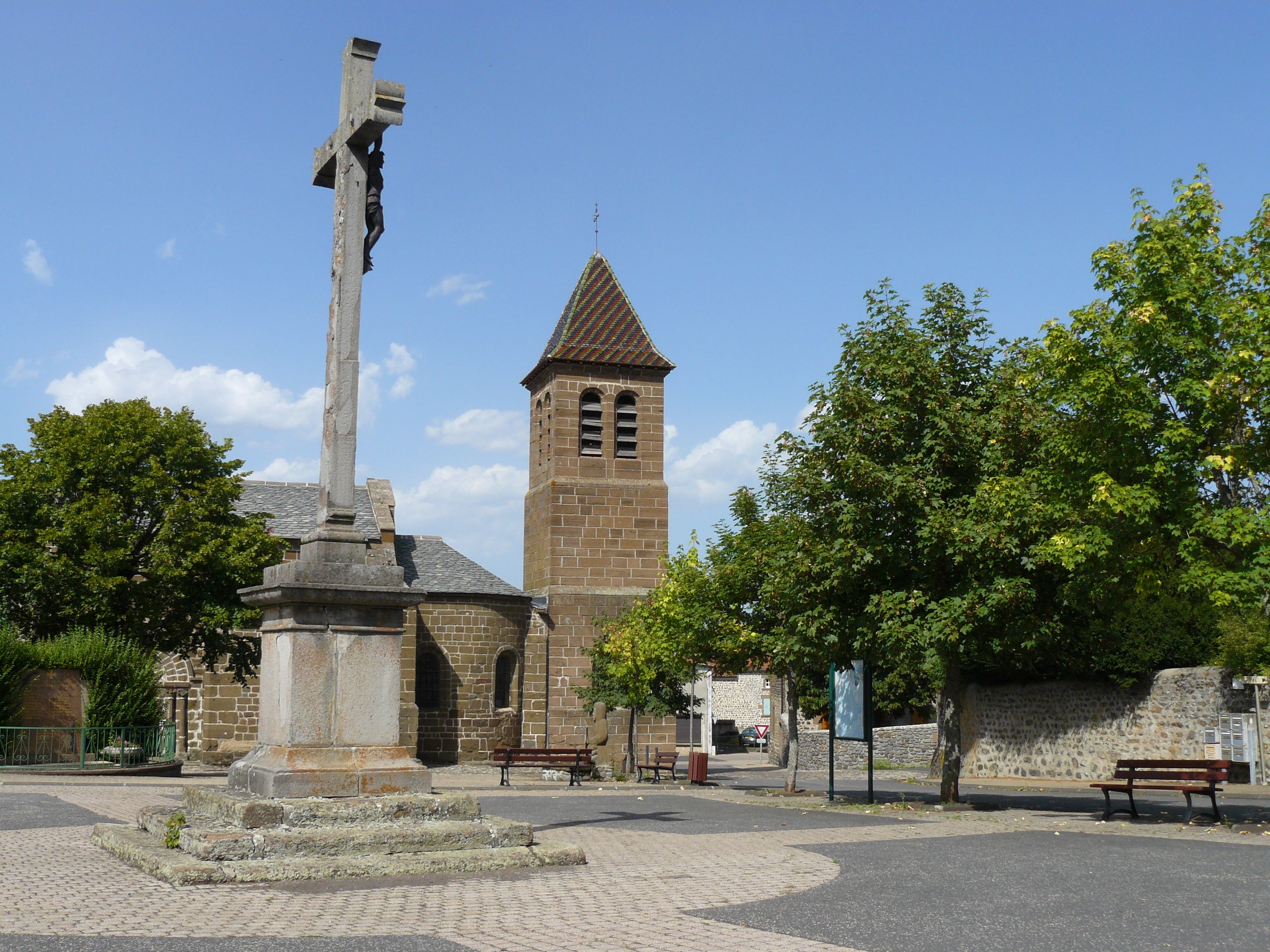 Vue de l'église de chaspuzac vue depuis la place de l'église.